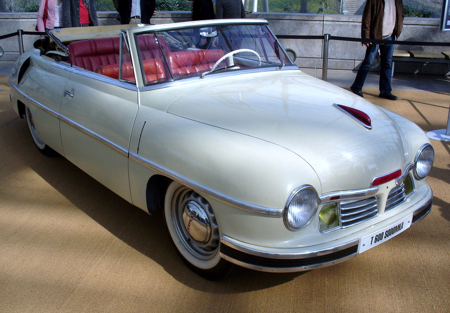 Tatra T 600 Sodomka Cabriolet